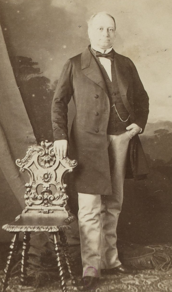 Personnalités françaises et étrangères sous le Second Empire.